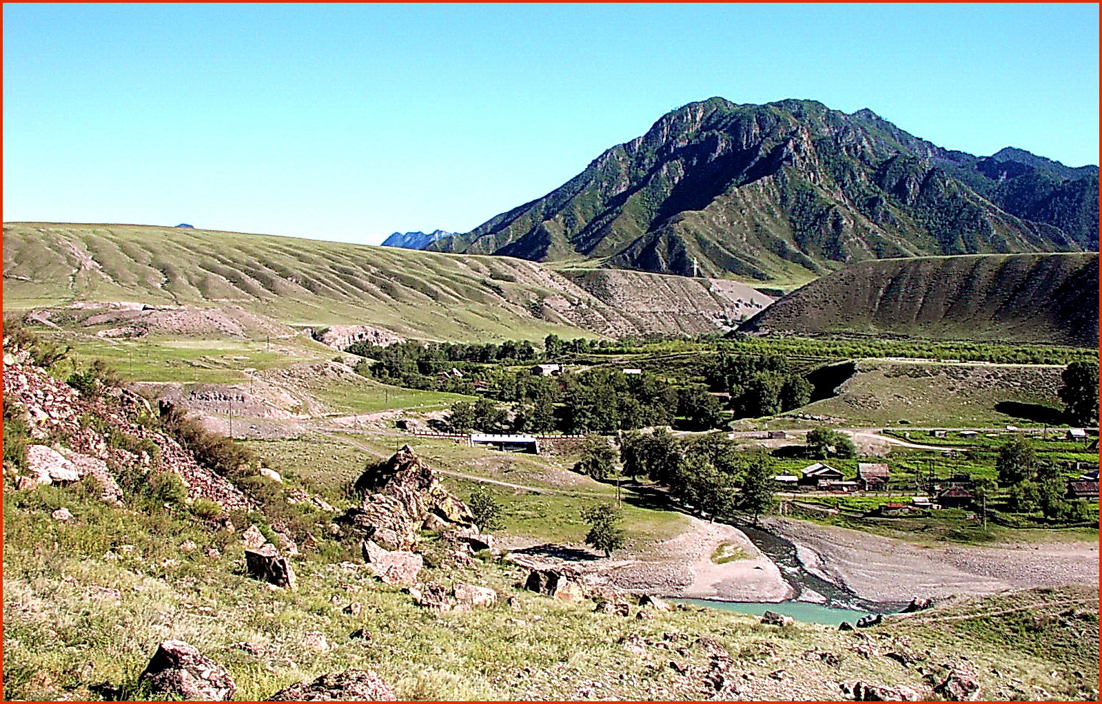 Дилювиально-аккумулятивные валы («высокие террасы») в Центральном Алтае, долина р. Катунь. Т. н. называемые «высокие террасы» Катуни, более чем 200-метровые толщи чисто промытых ясно-слоистых гравелисто-галечениковых дресвяников и щебня со впаянными в отложения без нарушения слоистоисти глыбы и валуны. Дилювиальные толщи формировались в зонах природных экранов в дилювиальеных потоках. Возможный абсолютный возраст — конец позднего плейстоцена.